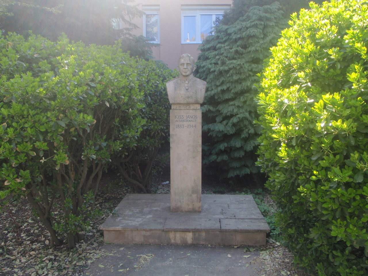 Janos Kiss Denkmal in Güns, Velemi-Strasse